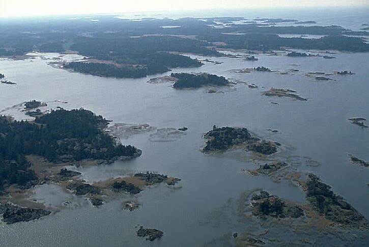 Bronsåldersmiljö Motiv: Ekens skärgård Nyckelord: Flygbilder, Riksintressen Kategori: Kust- och skärgårdsmiljö Bronsåldersmiljö.